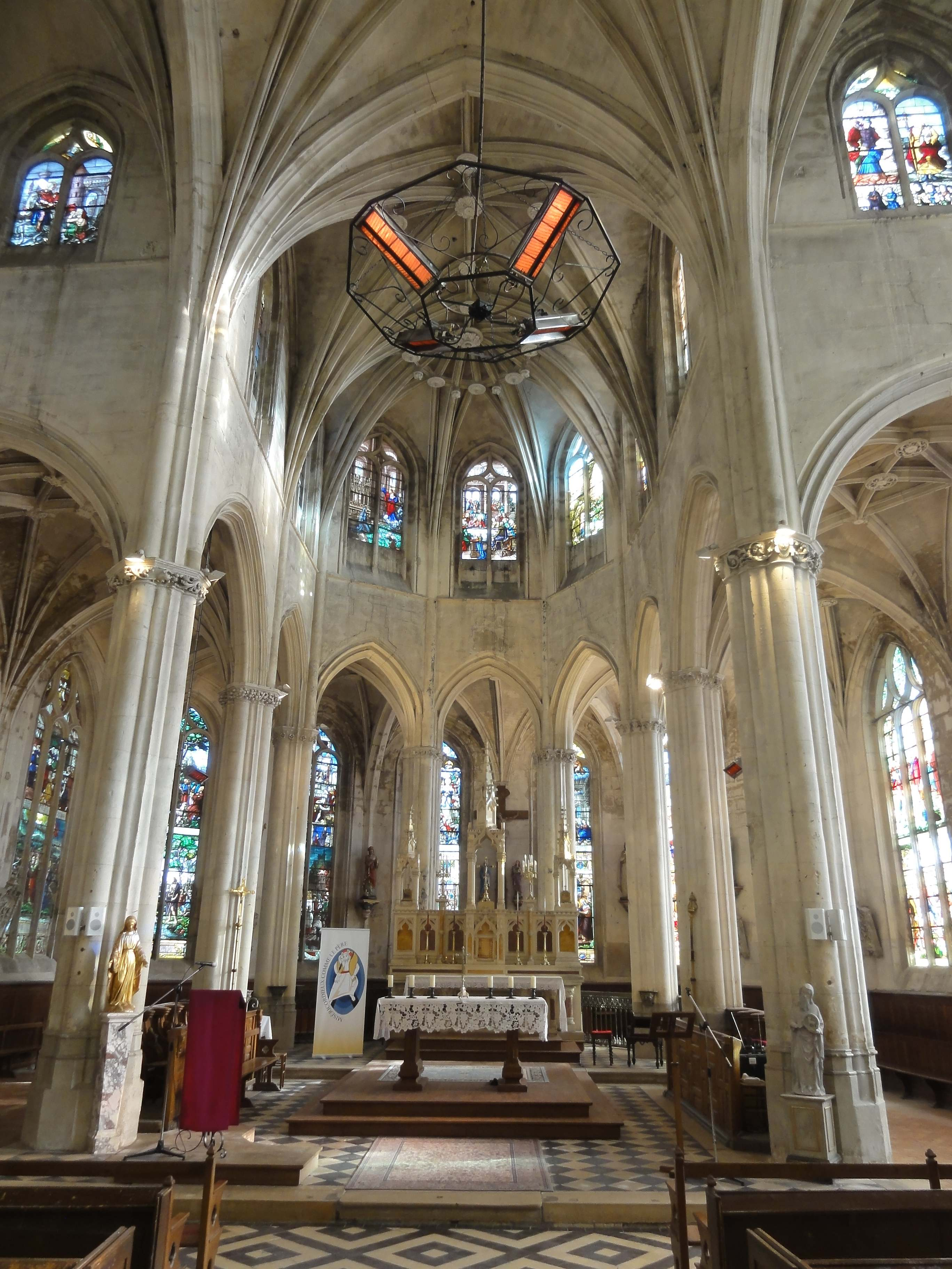 Intérieur de l'église - voir titre.